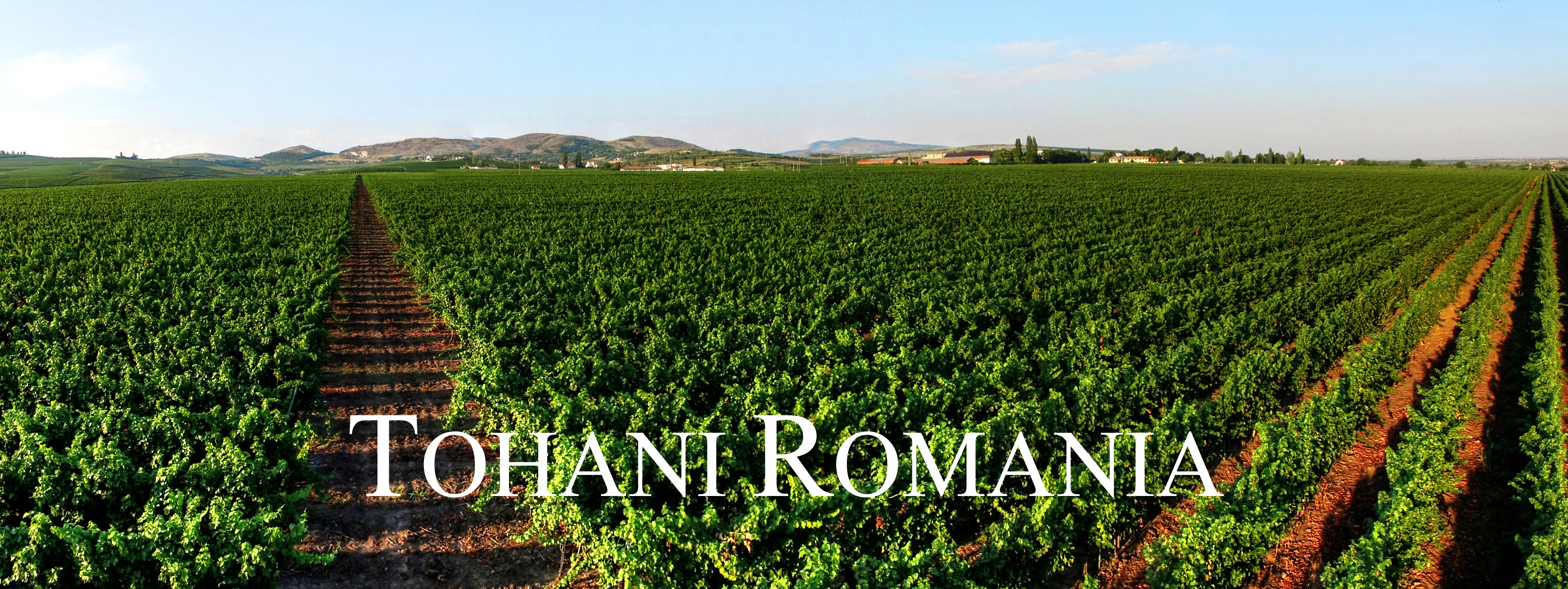 DealuMare